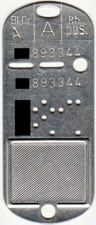 Erkennungsmarke des österreichischen Bundesheeres, Teil der Nummer unkenntlich gemacht